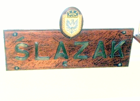 Eksponaty Instytutu im. Sikorskiego w Londynie